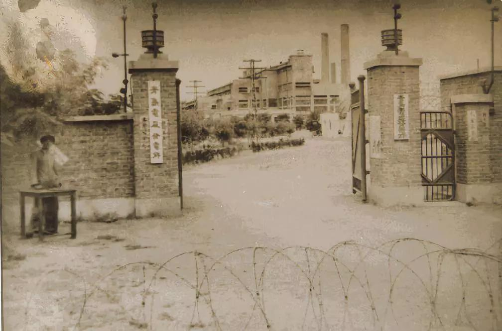 青岛发电厂大门外景1949年